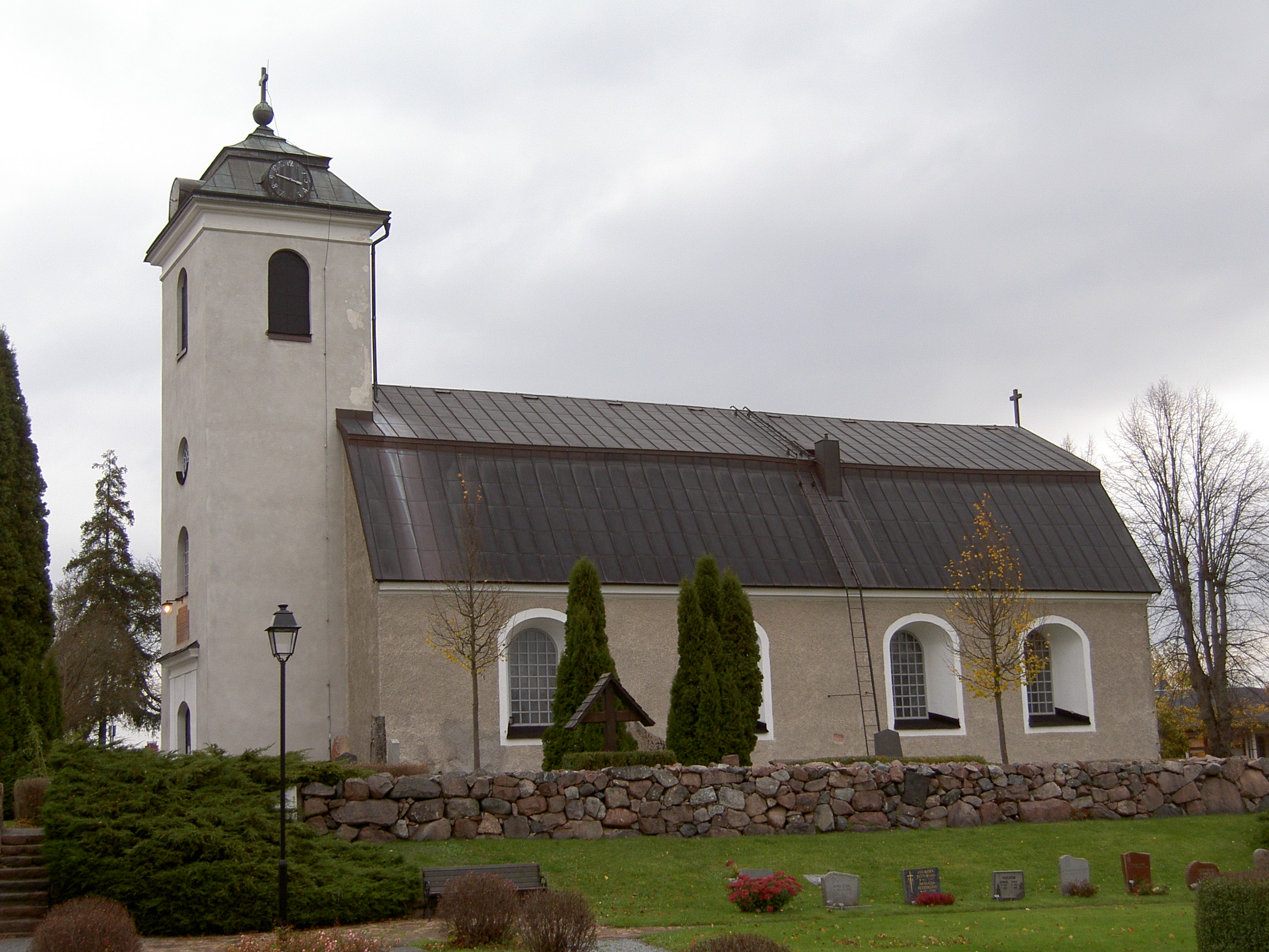 Fresta kyrka